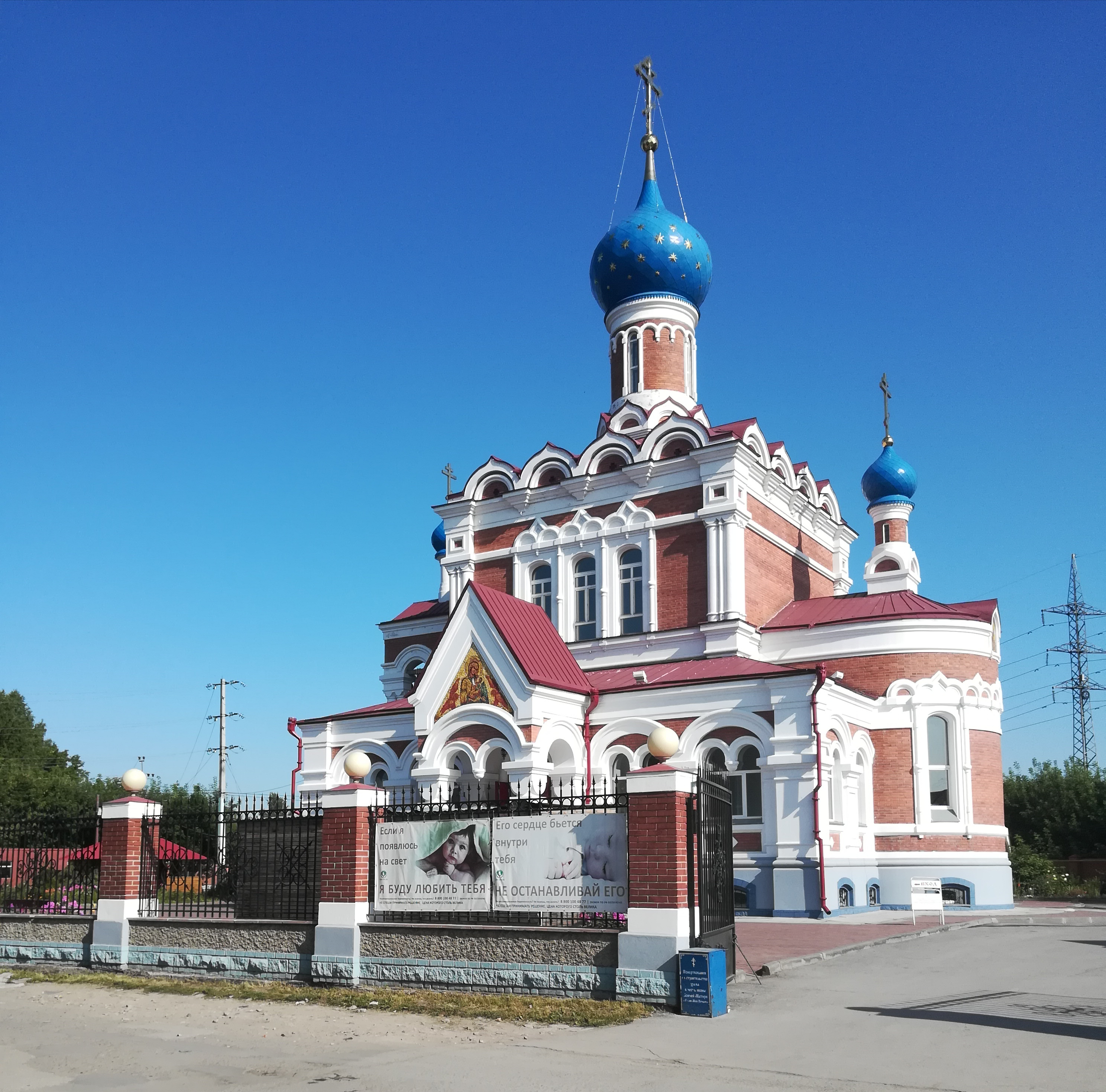 Клещихинское кладбище